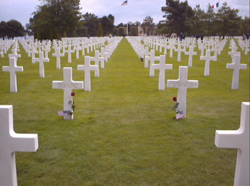 Le cimetière militaire américain de Normandie, à Colleville-sur-Mer. Source from License: Information presented on this web site is considered public information and may be distributed or copied. Use of appropriate byline/photo/image credits is requested.